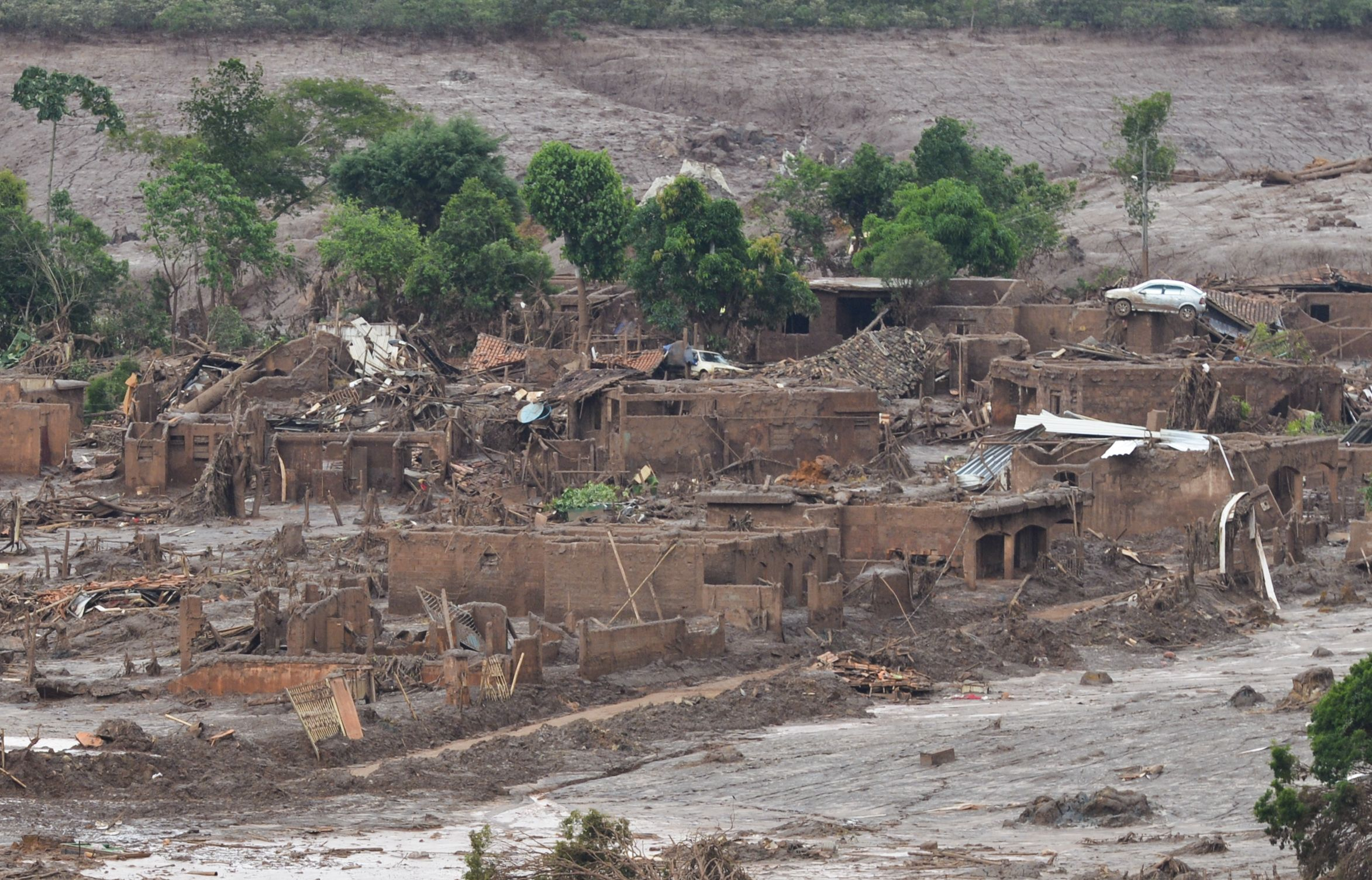 Distrito de Bento Rodrigues, em Mariana (MG), atingido pelo rompimento de duas barragens de rejeitos da mineradora Samarco.